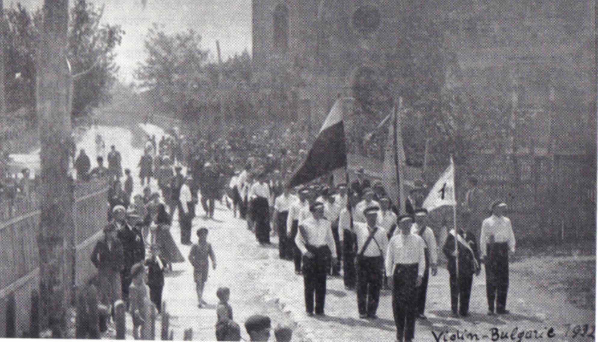 מצעד "יום השקל" של הקהילה היהודית בוידין, 1932. צולם בידי אלמוני